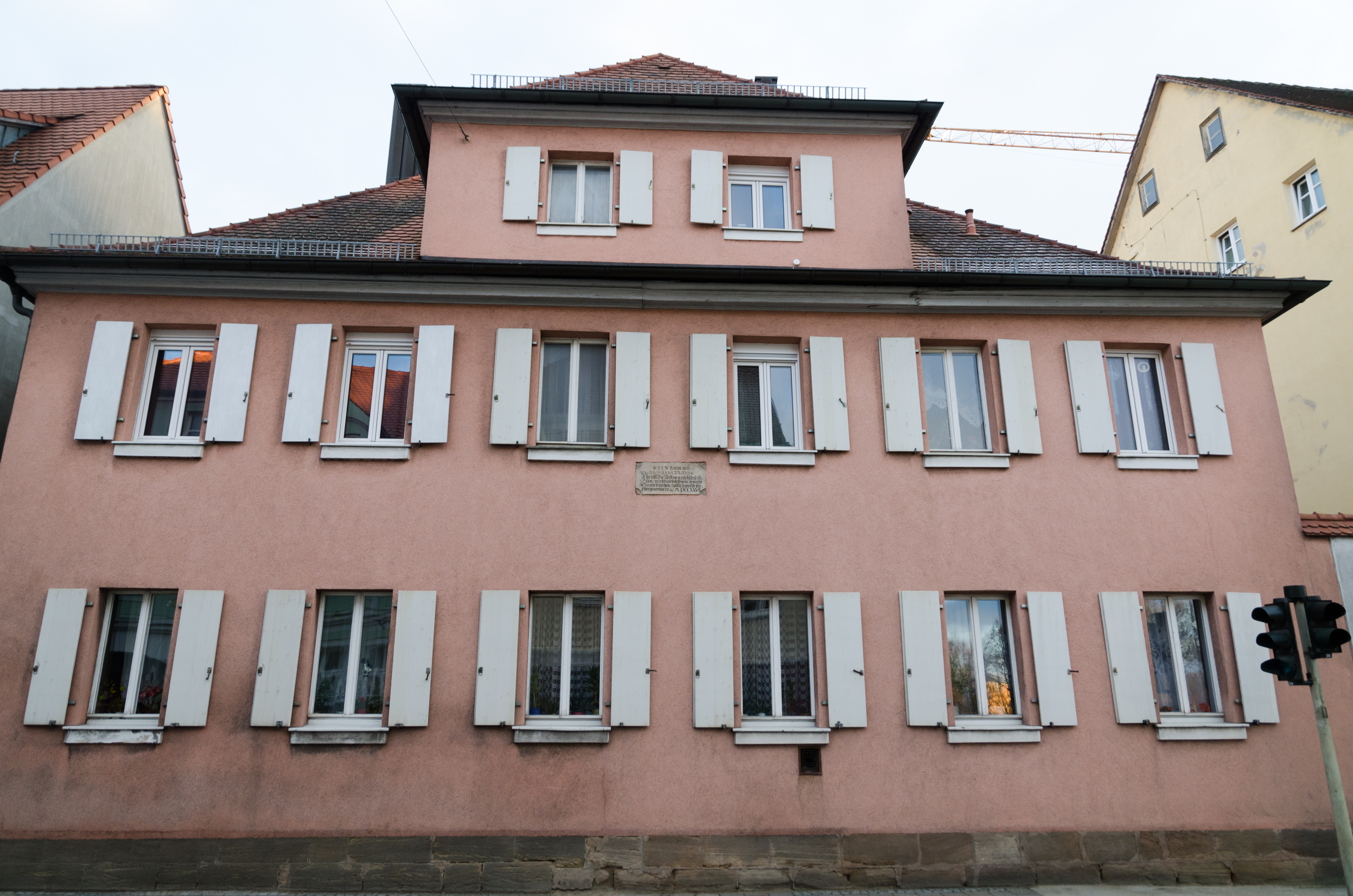 Ansbach, Würzburger Straße 39